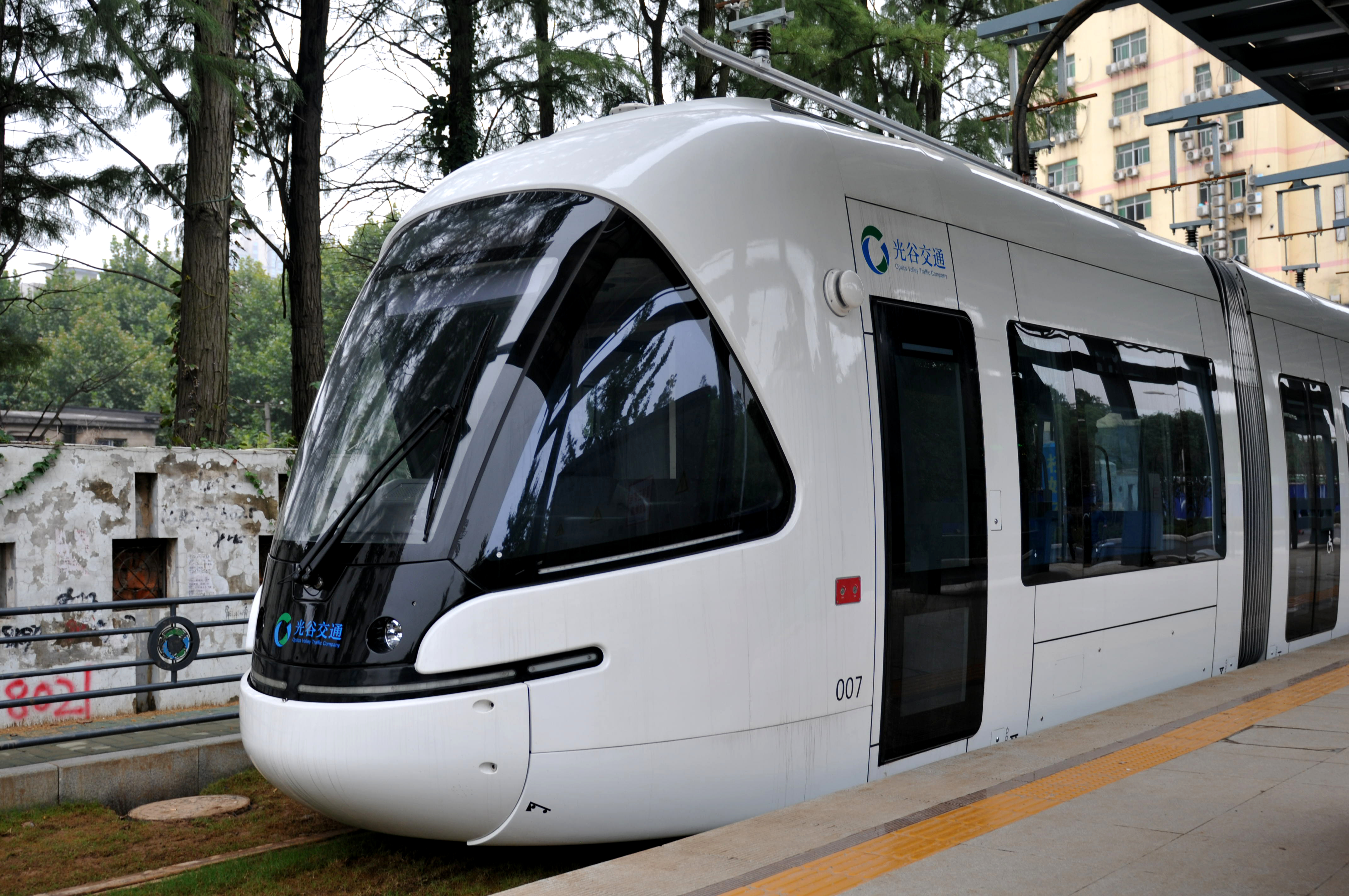 光谷量子号有轨电车